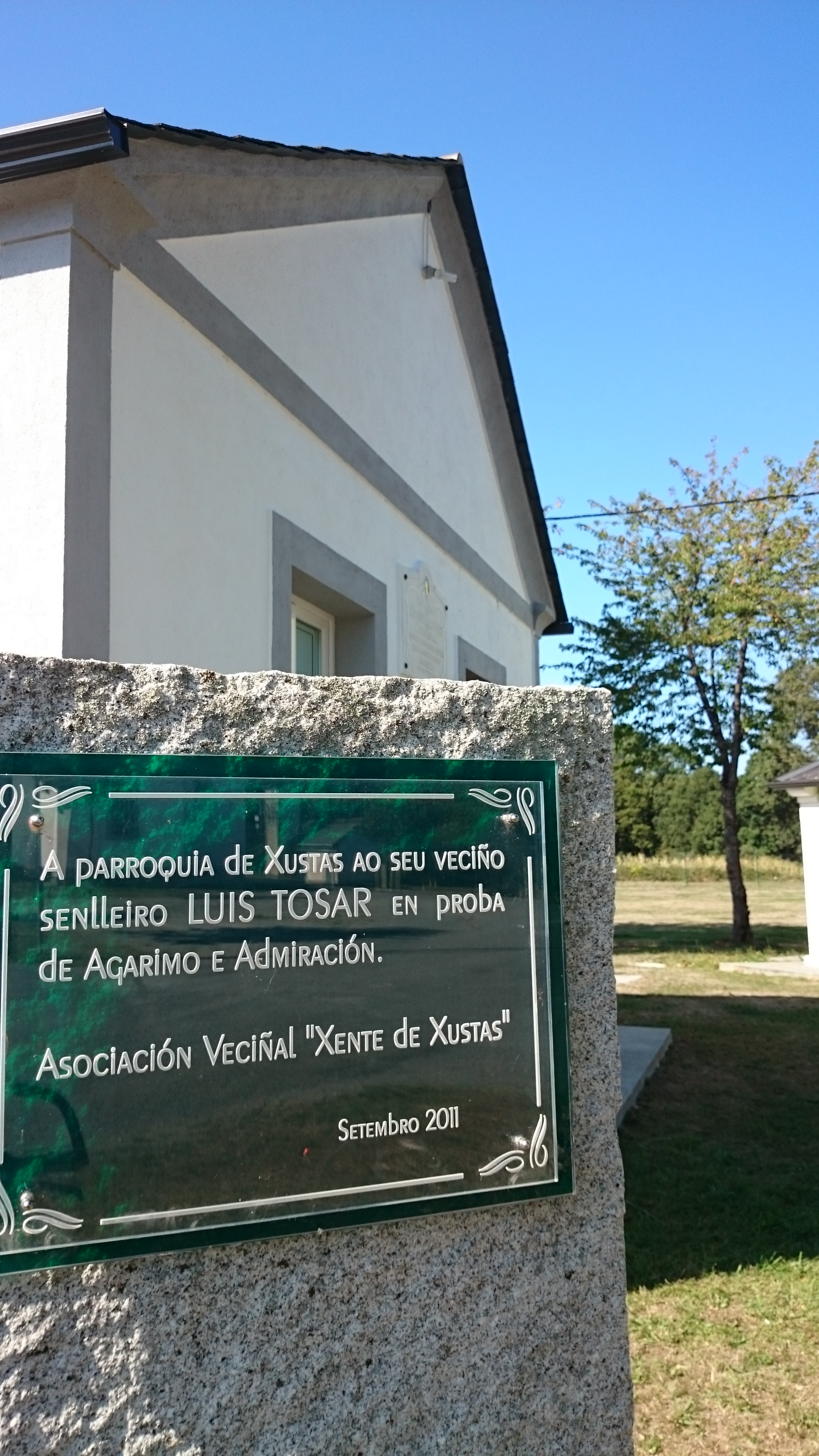 Monumento dedicado al actor Luis Tosar por los vecinos de su parroquia natal de Xustás, Terra Chá